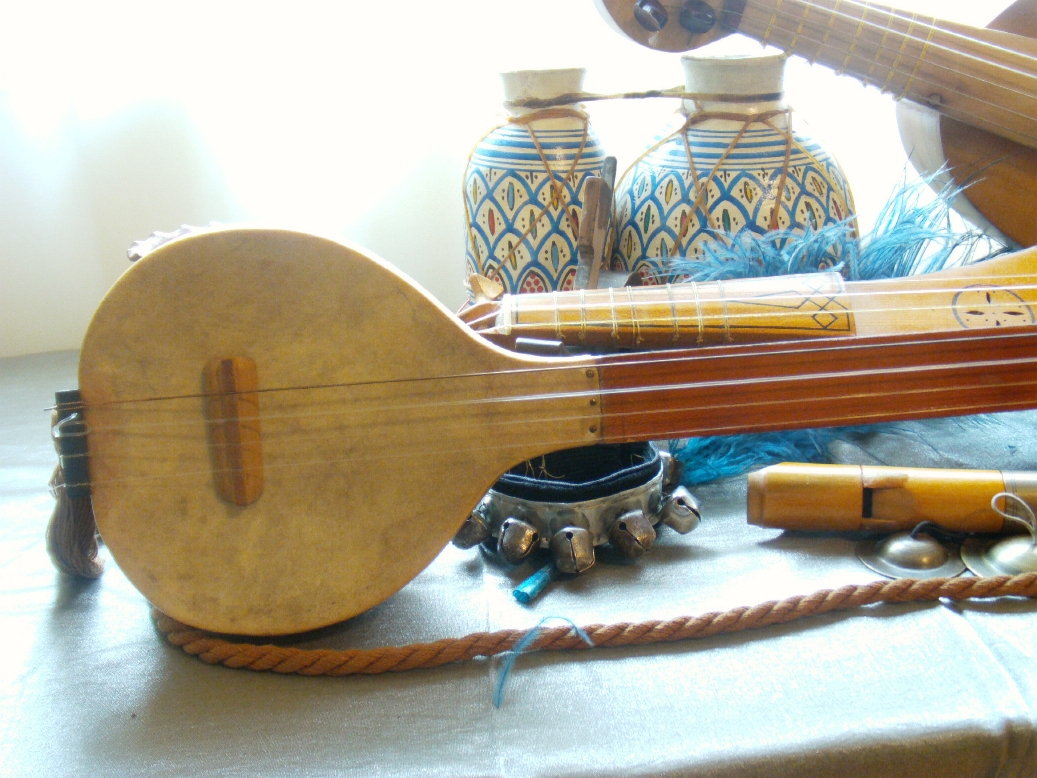 Tambura de cerca